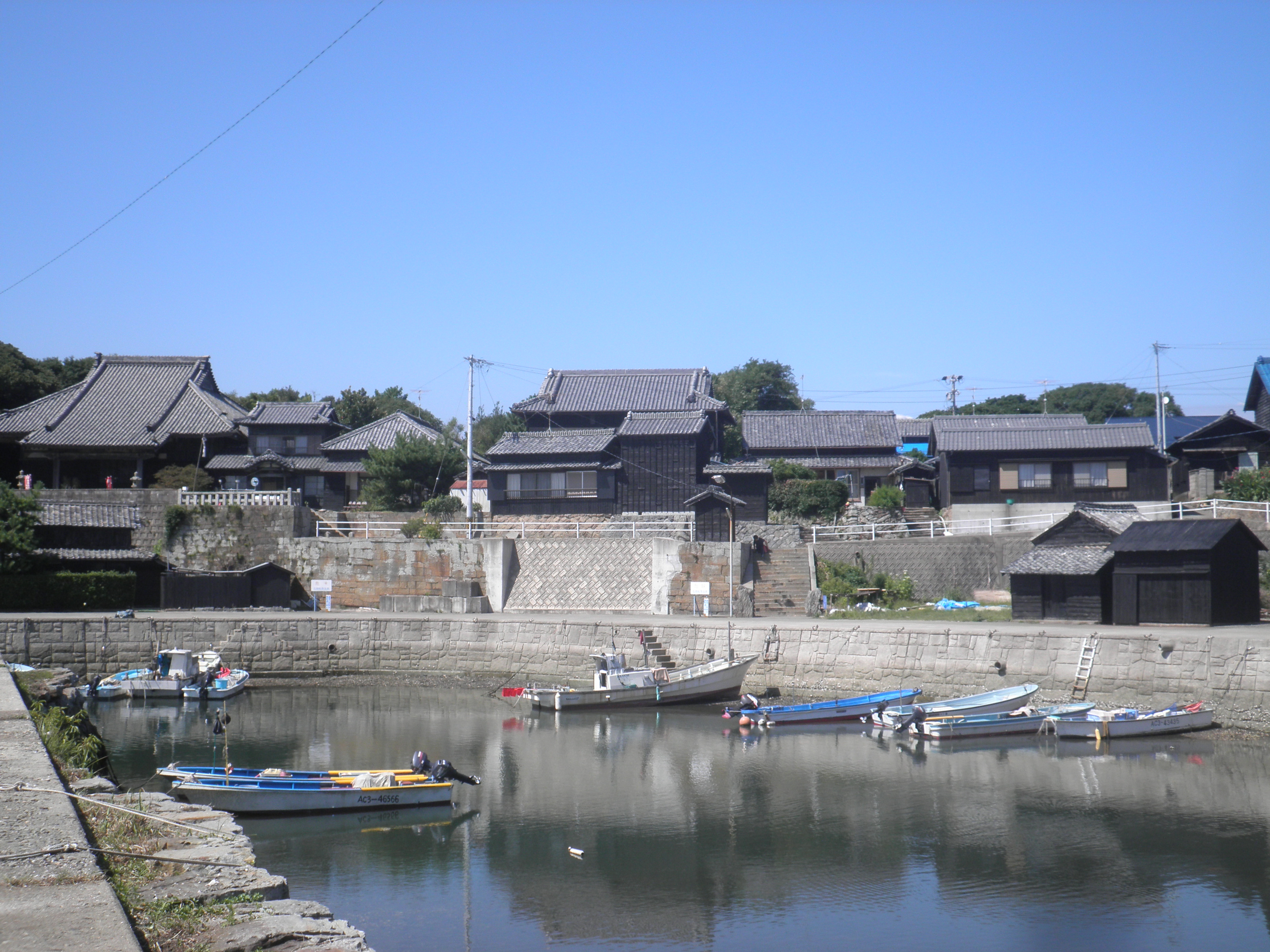 愛知県西尾市一色町の佐久島、西港